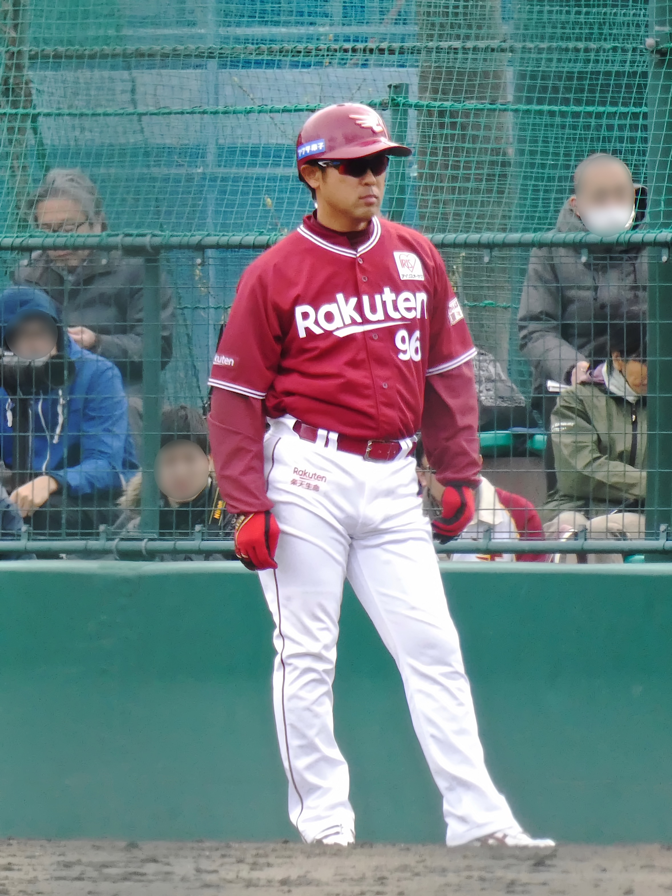 東北楽天ゴールデンイーグルスのコーチ「鉄平」。ロッテ浦和球場にて。